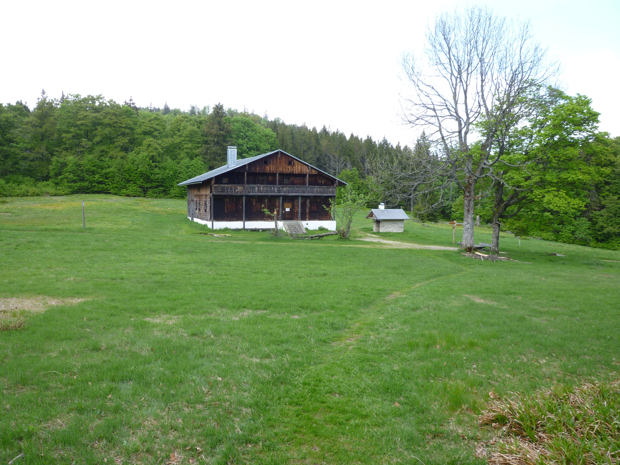 Der "Tummelplatz" ist eine ehemalige Hochweide im Nationalpark Bayerischer Wald. Das ehemalige Forsthaus wird heute von der Nationalparkverwaltung genutzt.